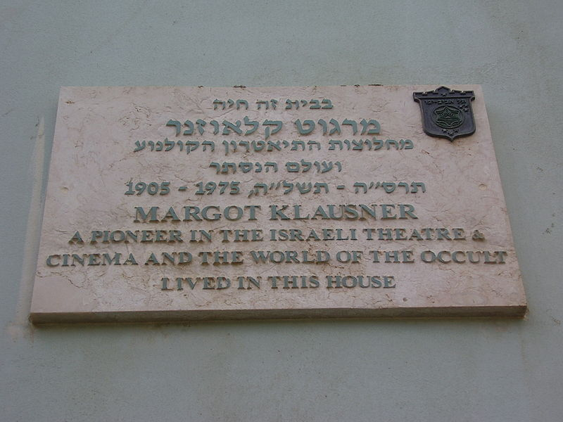 Gedenktafel